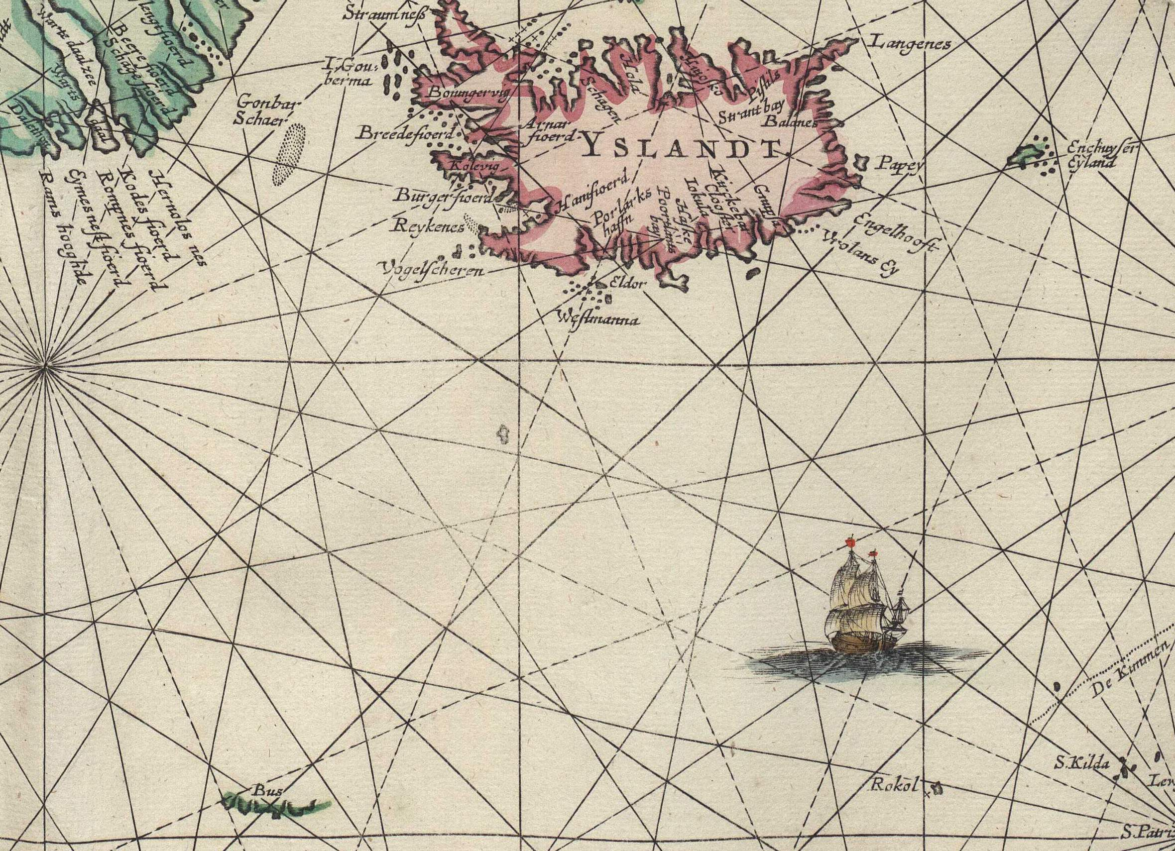 Ausschnitt aus einer Karte, zeigt Island und die Phantominseln Bus und Enchhuyser